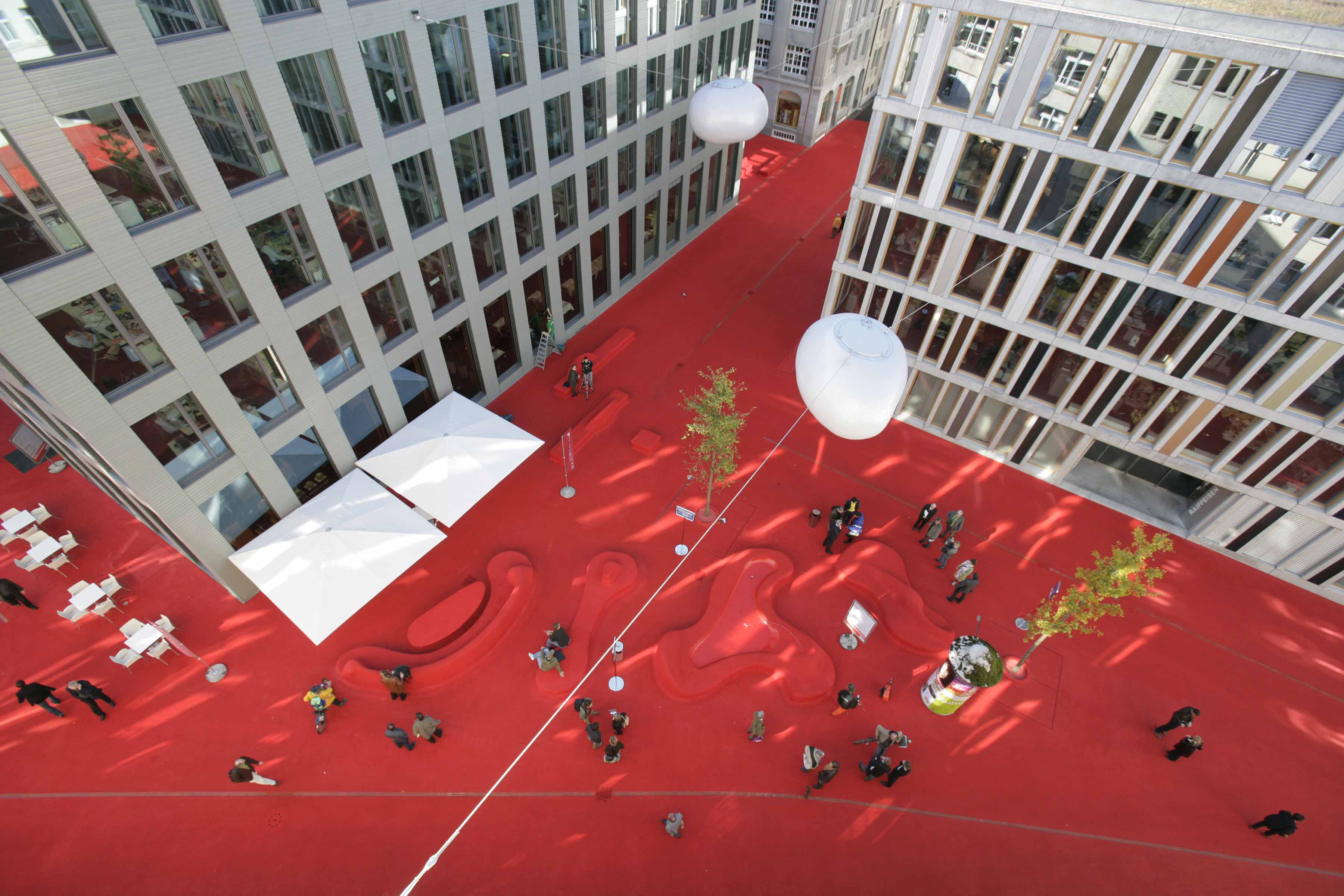 Die Stadtlounge fasst im Bleicheli-Quartier alle Plätze und Resträume zu einem homogenen Ganzen zusammen.